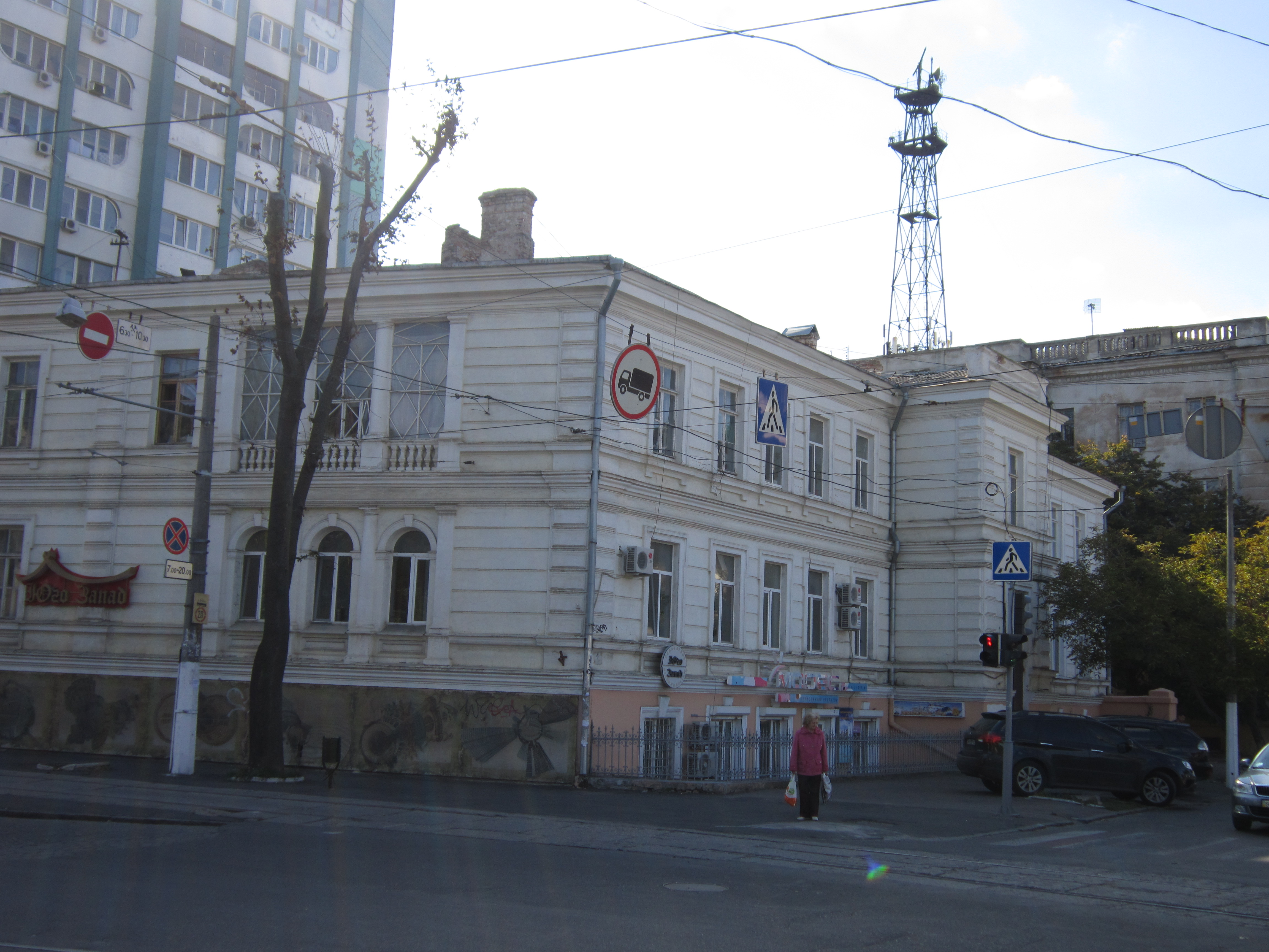 Будівля юнкерського піхотного училища, Одеса, Французький бул., 2 ріг Італійського бул., 1